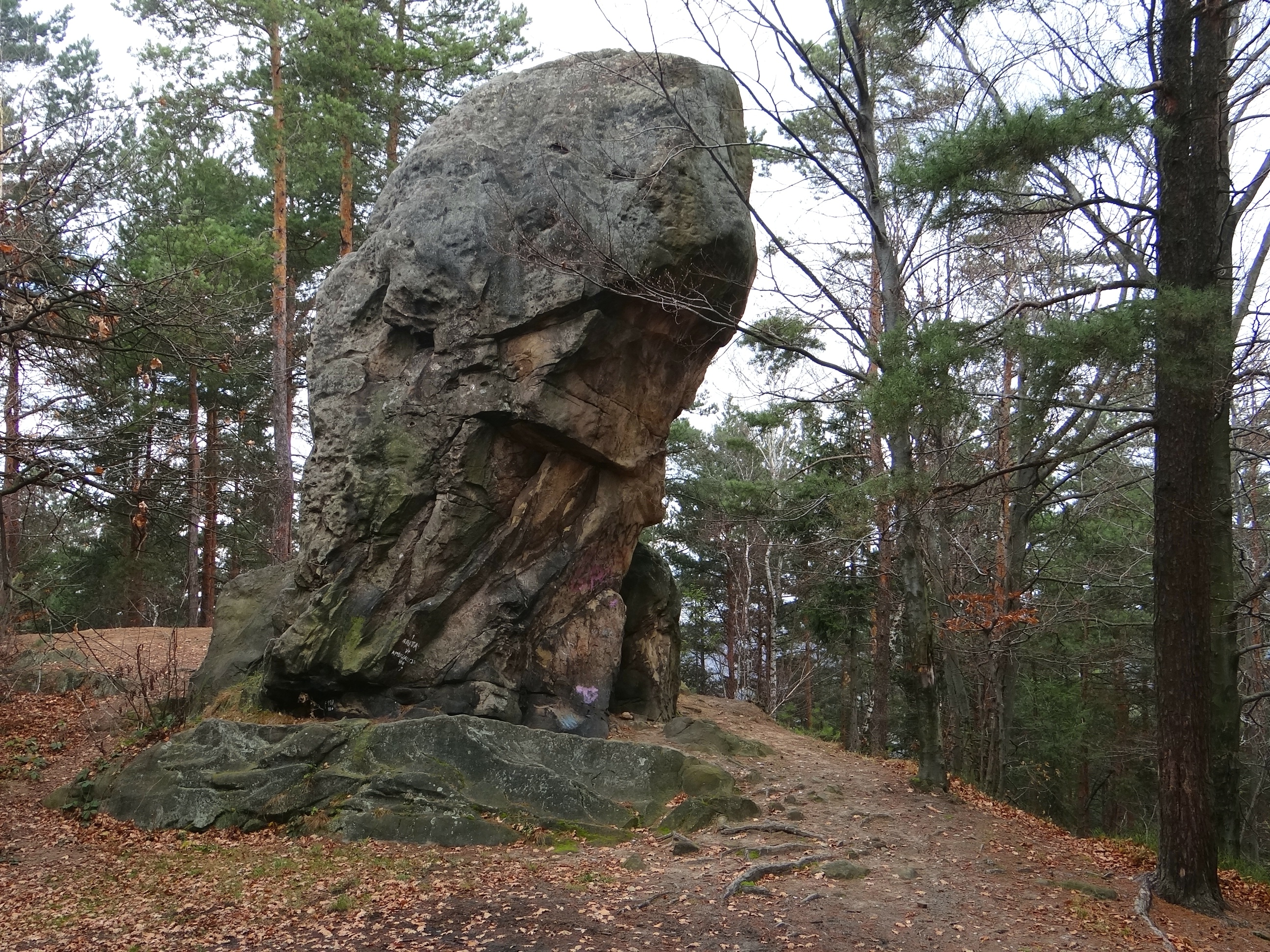 Diabelski Kamień w Rudniku